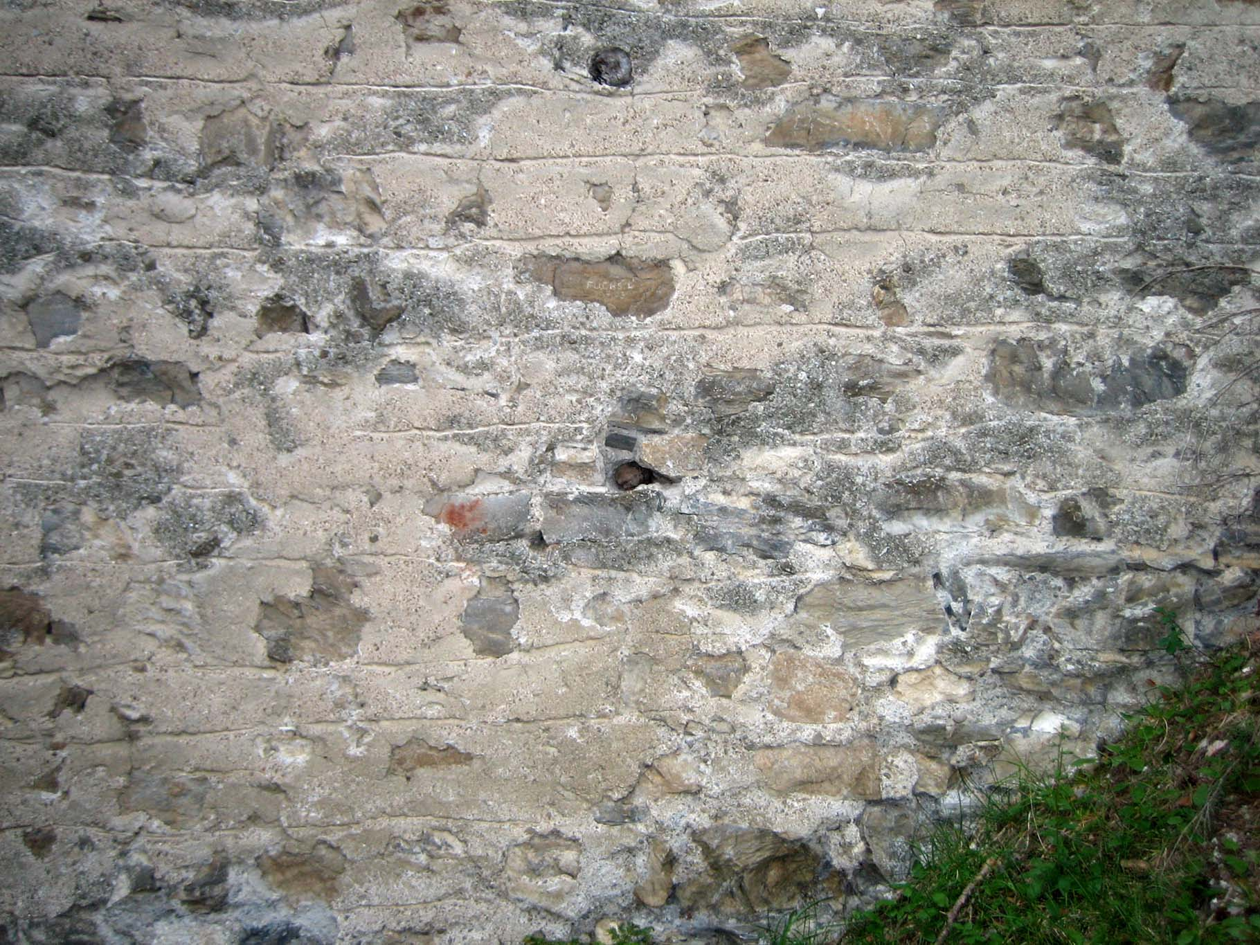 Turmmauer mit Fugenstrich